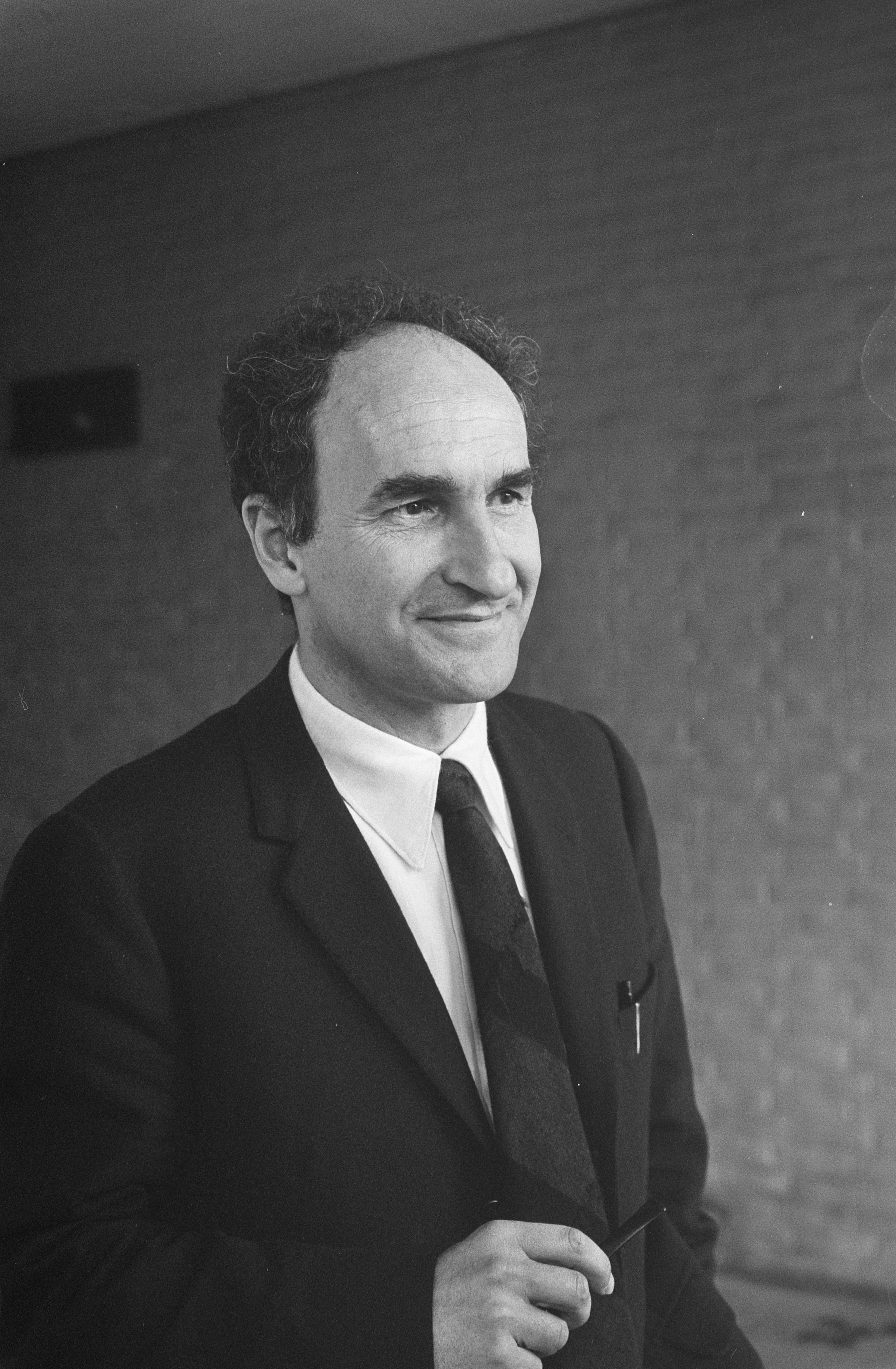 Collectie / Archief : Fotocollectie Anefo Reportage / Serie : [ onbekend ] Beschrijving : Tentoonstelling van de Spaanse kunstenaar Eduardo Chilli in Stedelijk Museum Amsterdam geopend E. Chillida (kop) Datum : 25 april 1969 Locatie : Amsterdam, Noord-Holland Trefwoorden : KOPPEN, kunstenaars, musea, tentoonstellingen Persoonsnaam : Eduardo Chillida Fotograaf : Mieremet, Rob / Anefo Auteursrechthebbende : Nationaal Archief Materiaalsoort : Negatief (zwart/wit) Nummer archiefinventaris : bekijk toegang 2.24.01.05 Bestanddeelnummer : 922-3408